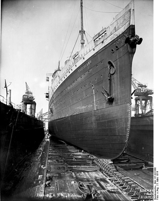 Dockung 4. S.S. "Vaterland" Blohm & Voss ; 5t Mrz 1914, Hamburg